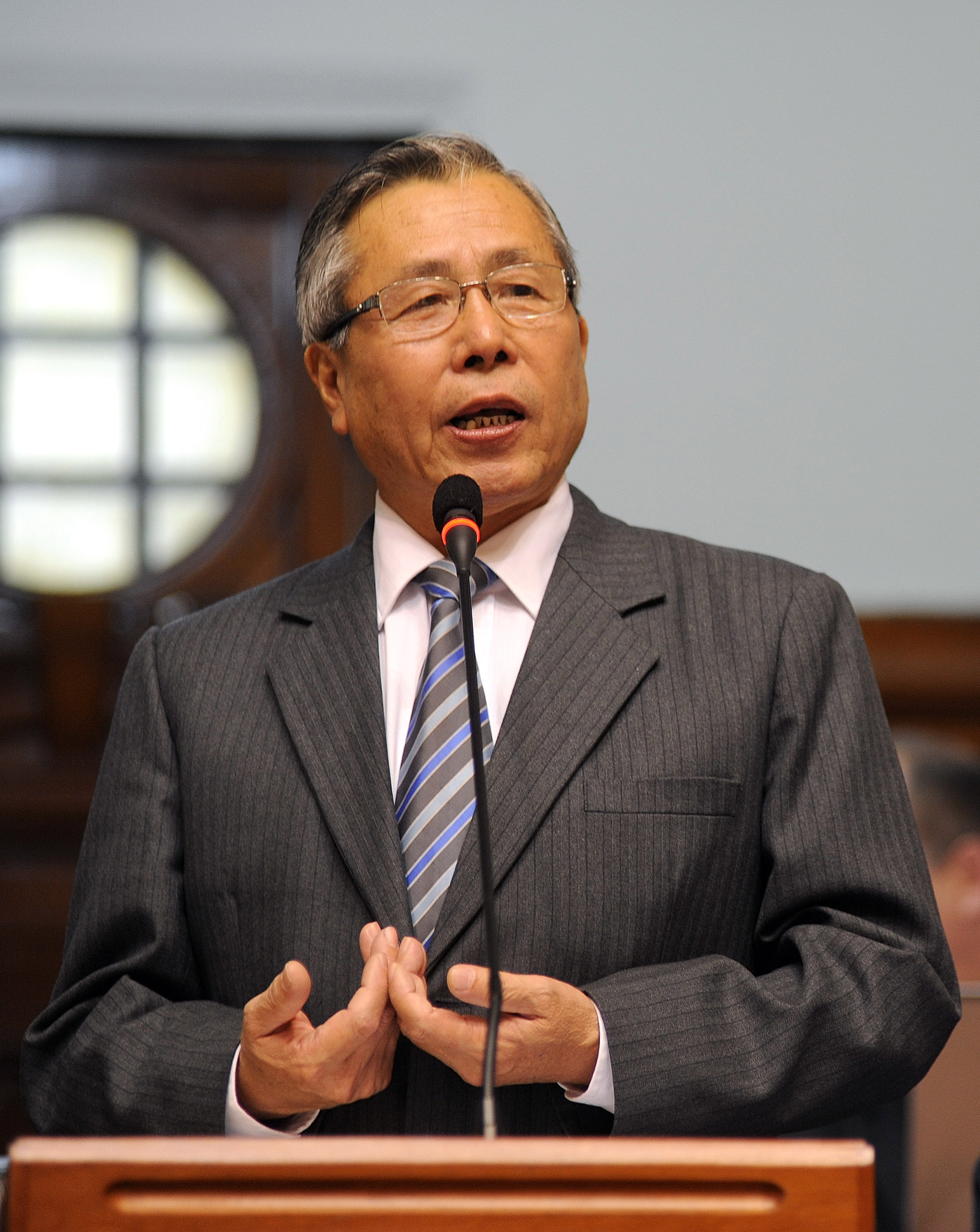 El legislador Santiago Fujimori expresa su posición en el debate parlamentario realizado esta mañana por el Pleno congresal.